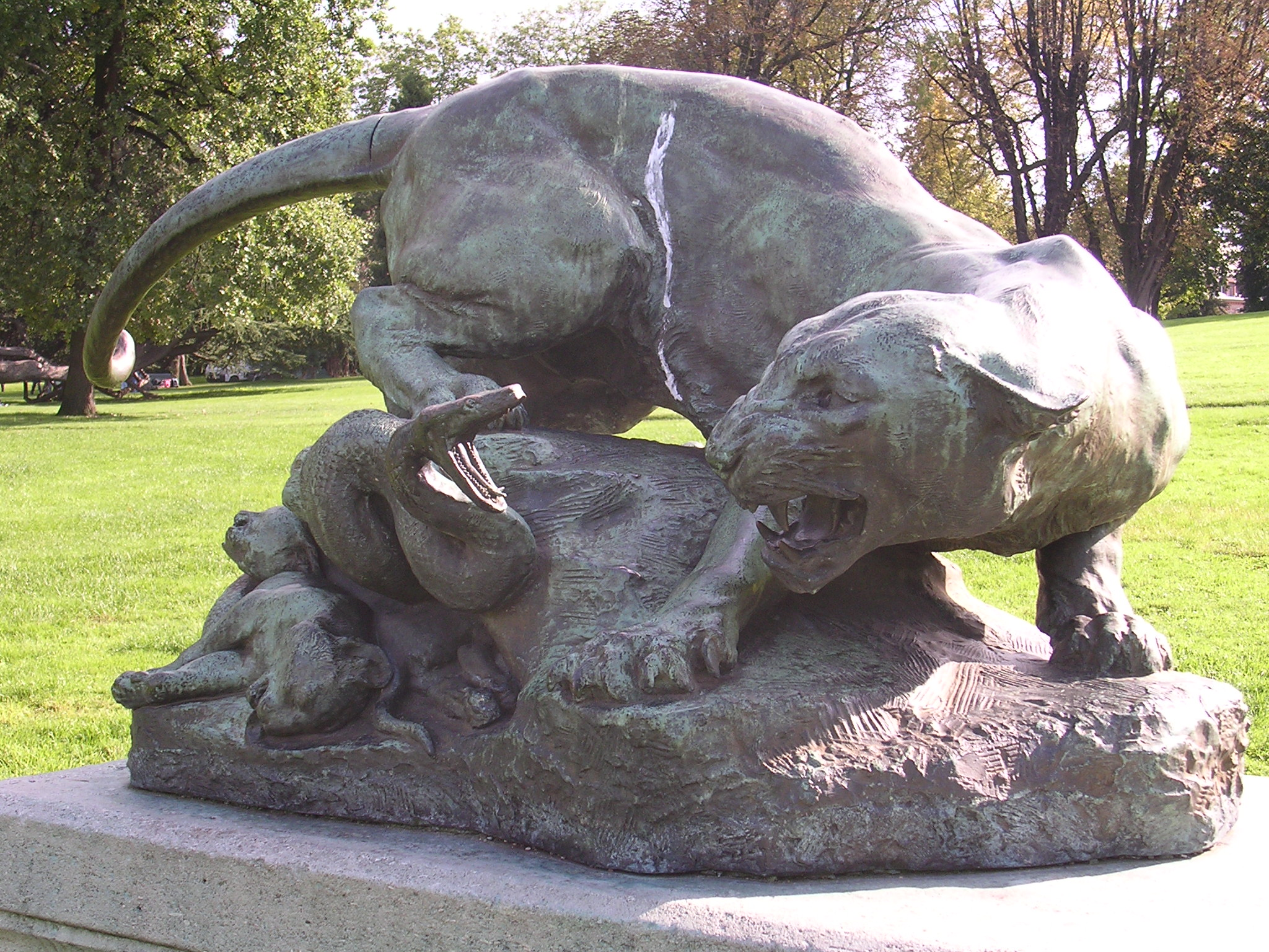 Georges Gardet: Drame au désert (1891, bronze, Paris, Parc Montsouris, France) Auteur : Piero d'Houin dit Inocybe ~~